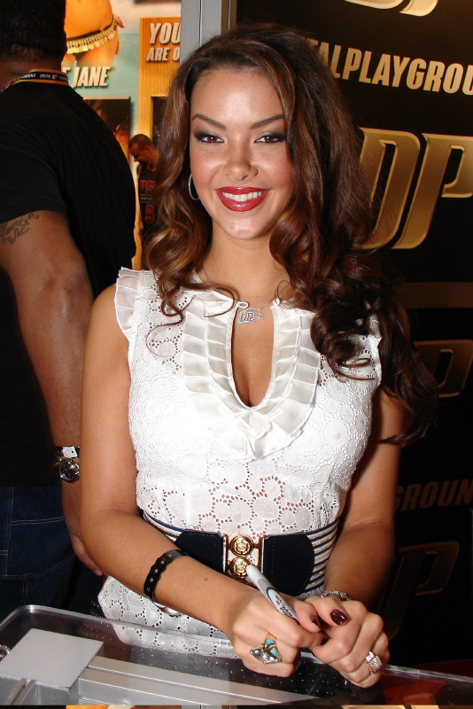 Sophia Santi